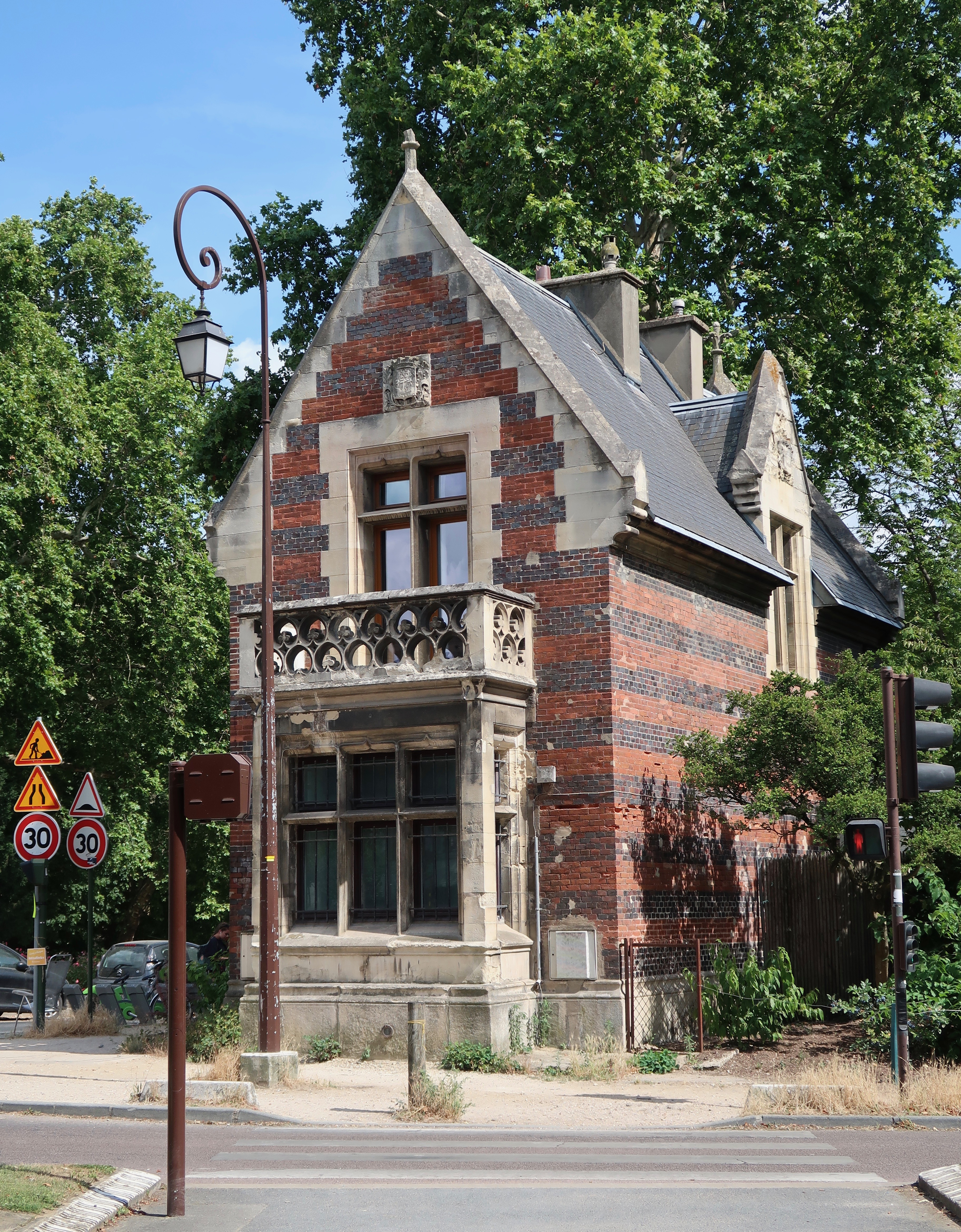 Anciens pavillons de garde du bois de Boulogne (Paris, 16e), au niveau du croisement du boulevard Maurice-Barrès et de l'avenue de Madrid à Neuilly-sur-Seine (Hauts-de-Seine). Architecte : Gabriel Davioud.